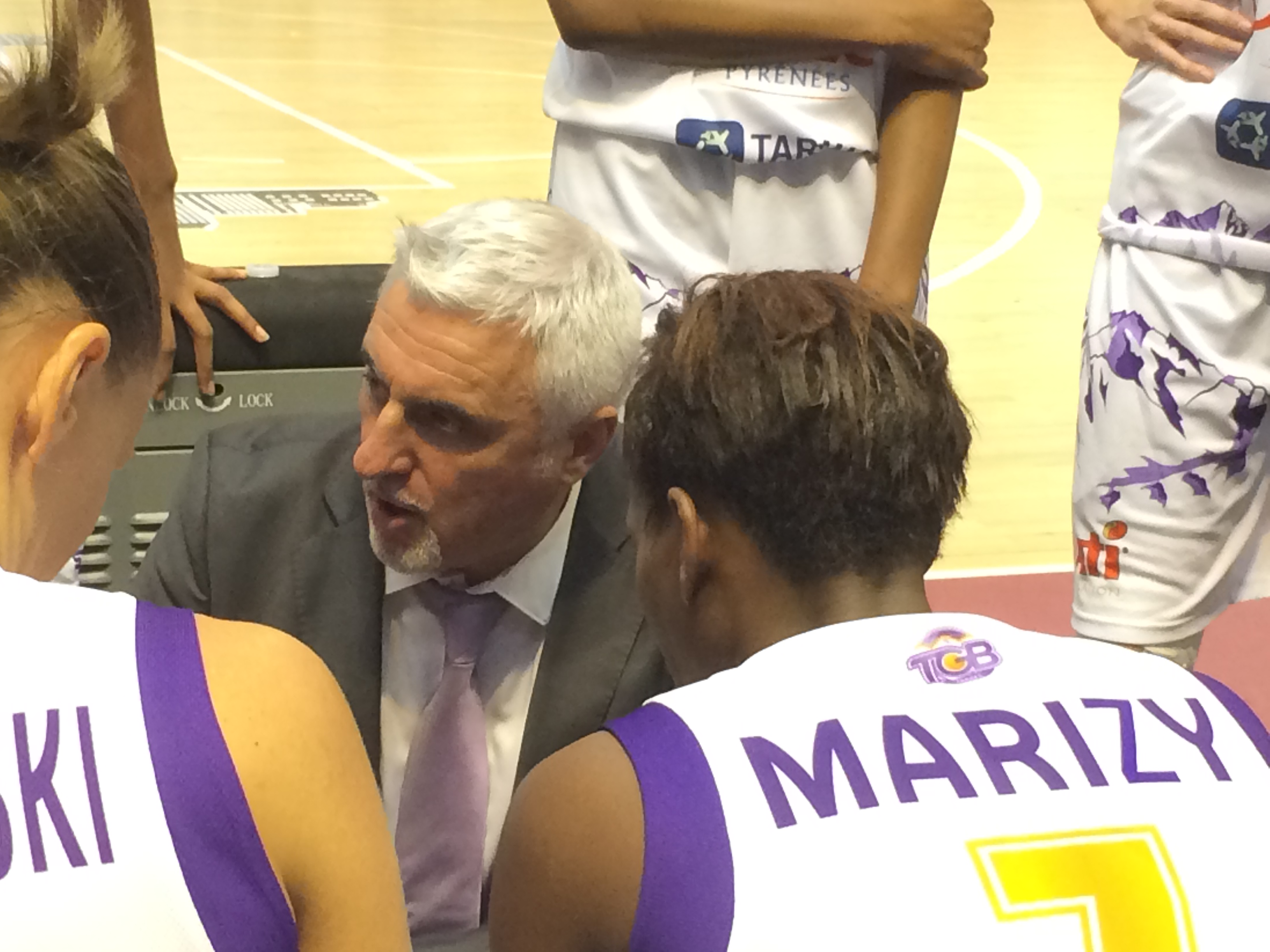 L'entraîneur de basket-ball François Gomez avec Tarbes lors de l'Open LFB 2016.